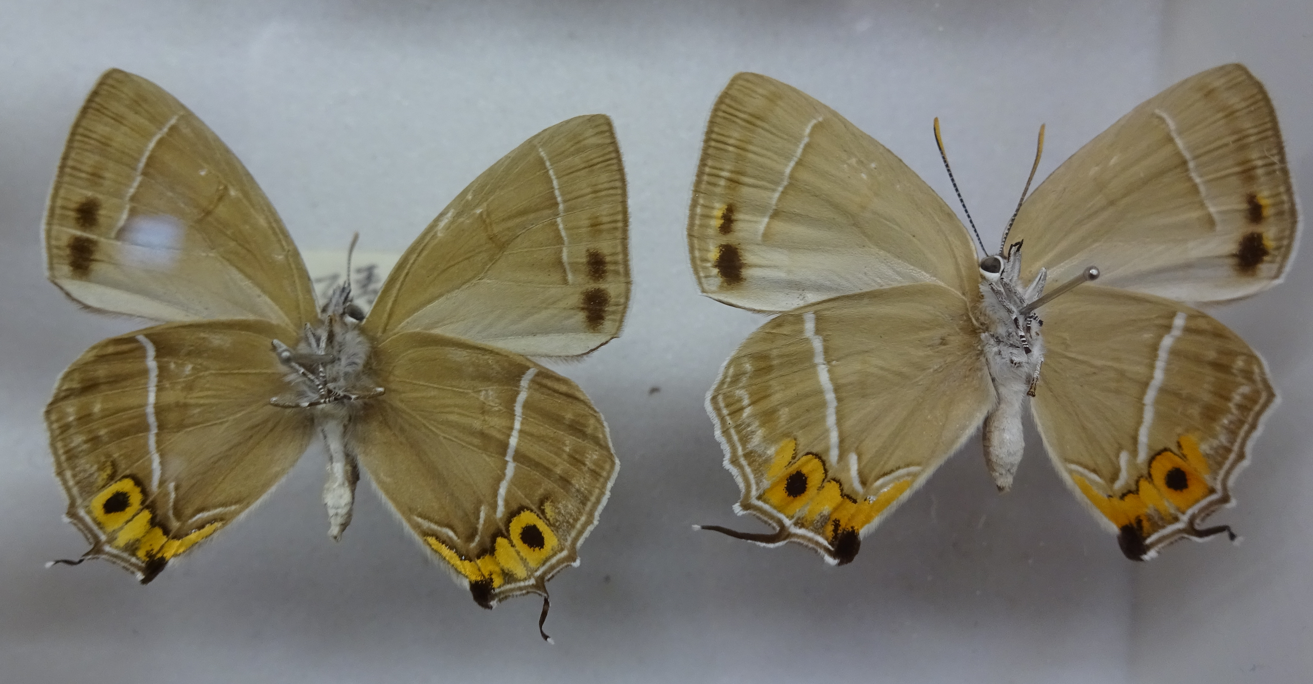 クロミドリシジミ